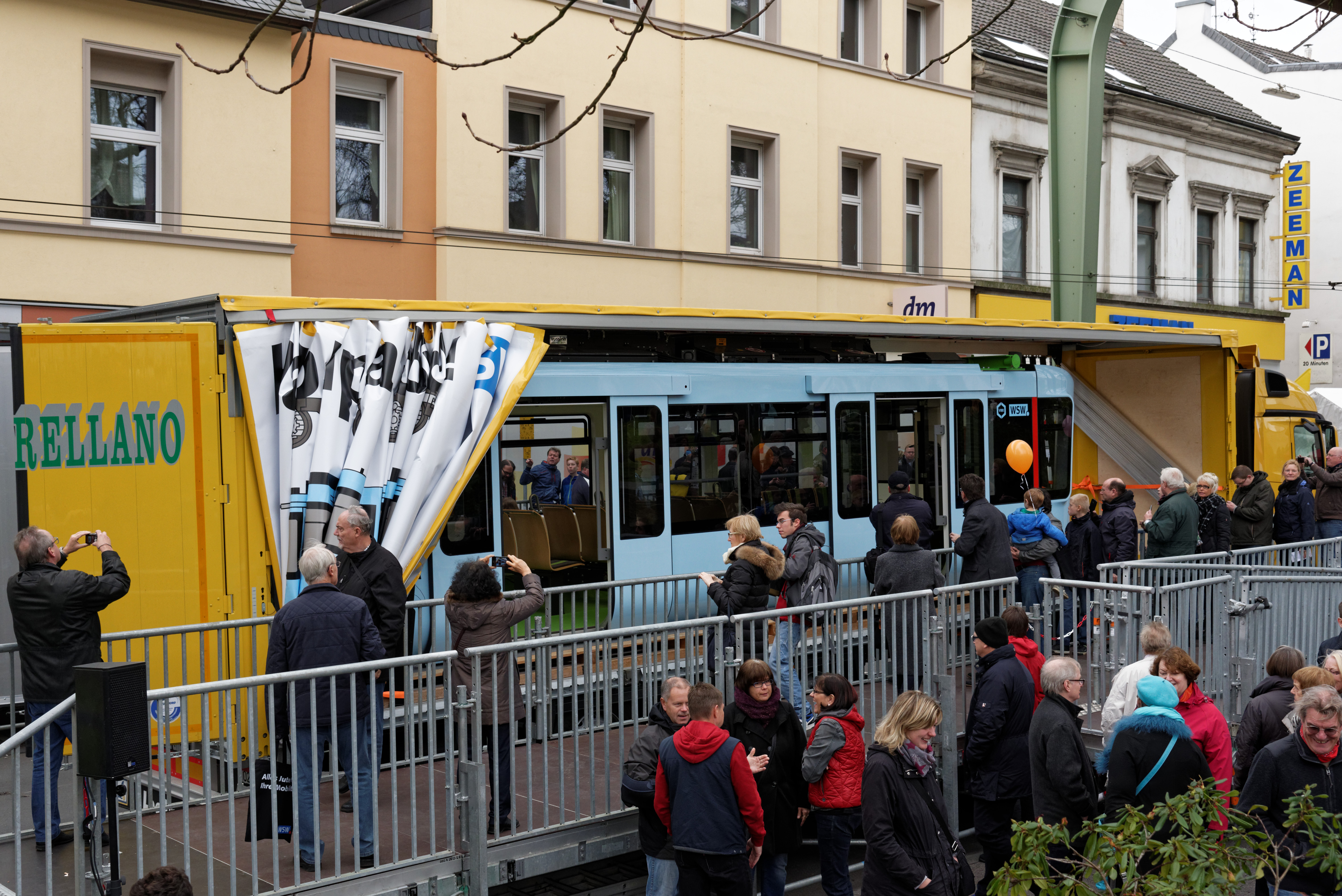 LKW mit neuer Schwebebahn in Wuppertal